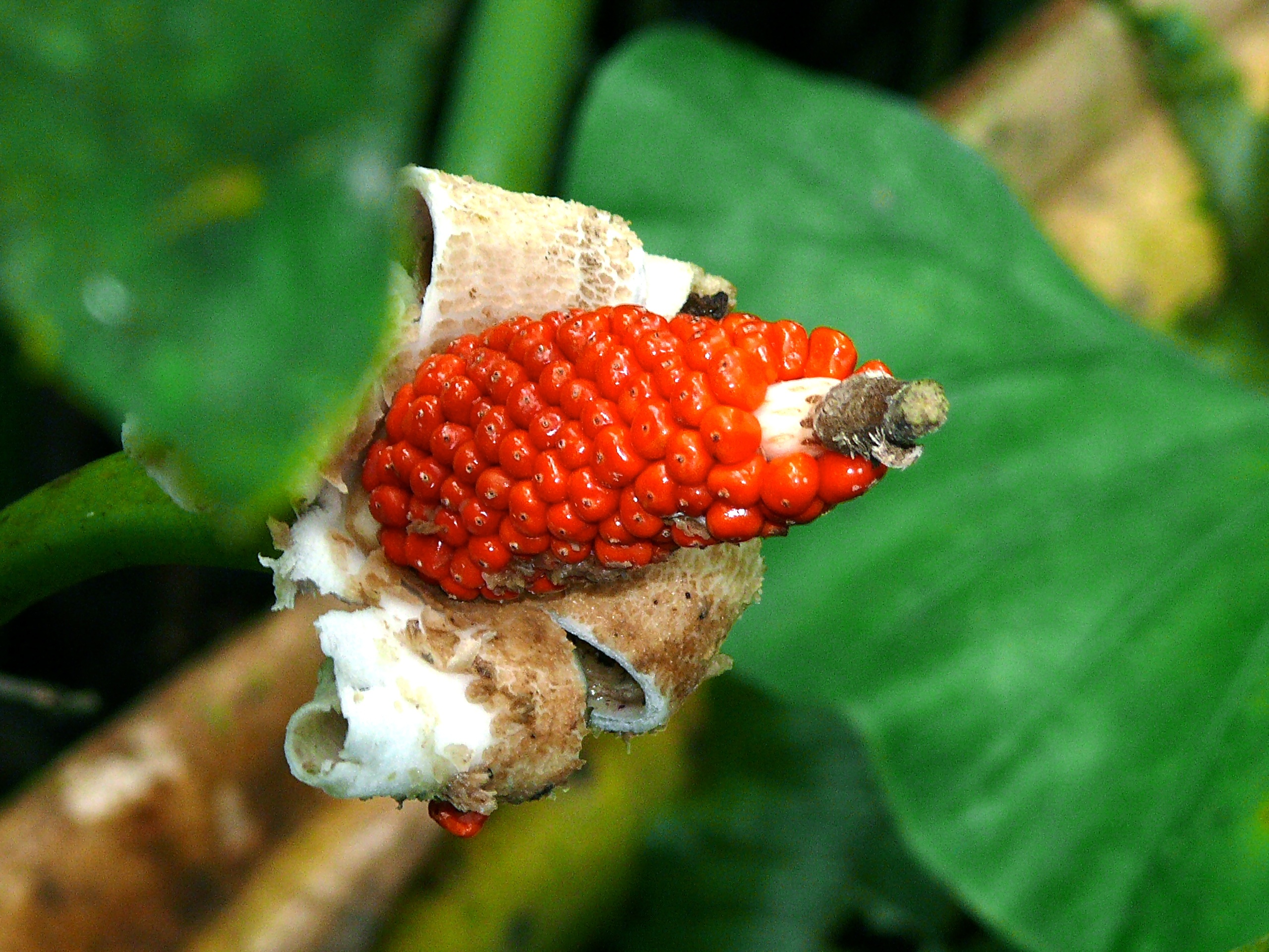 Gunung Mulu NP, Sarawak, MALAYSIA